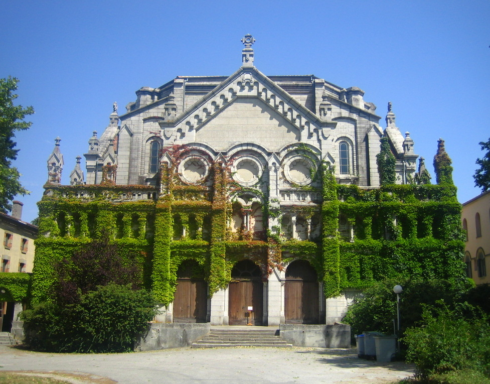 Monestir de Prolha